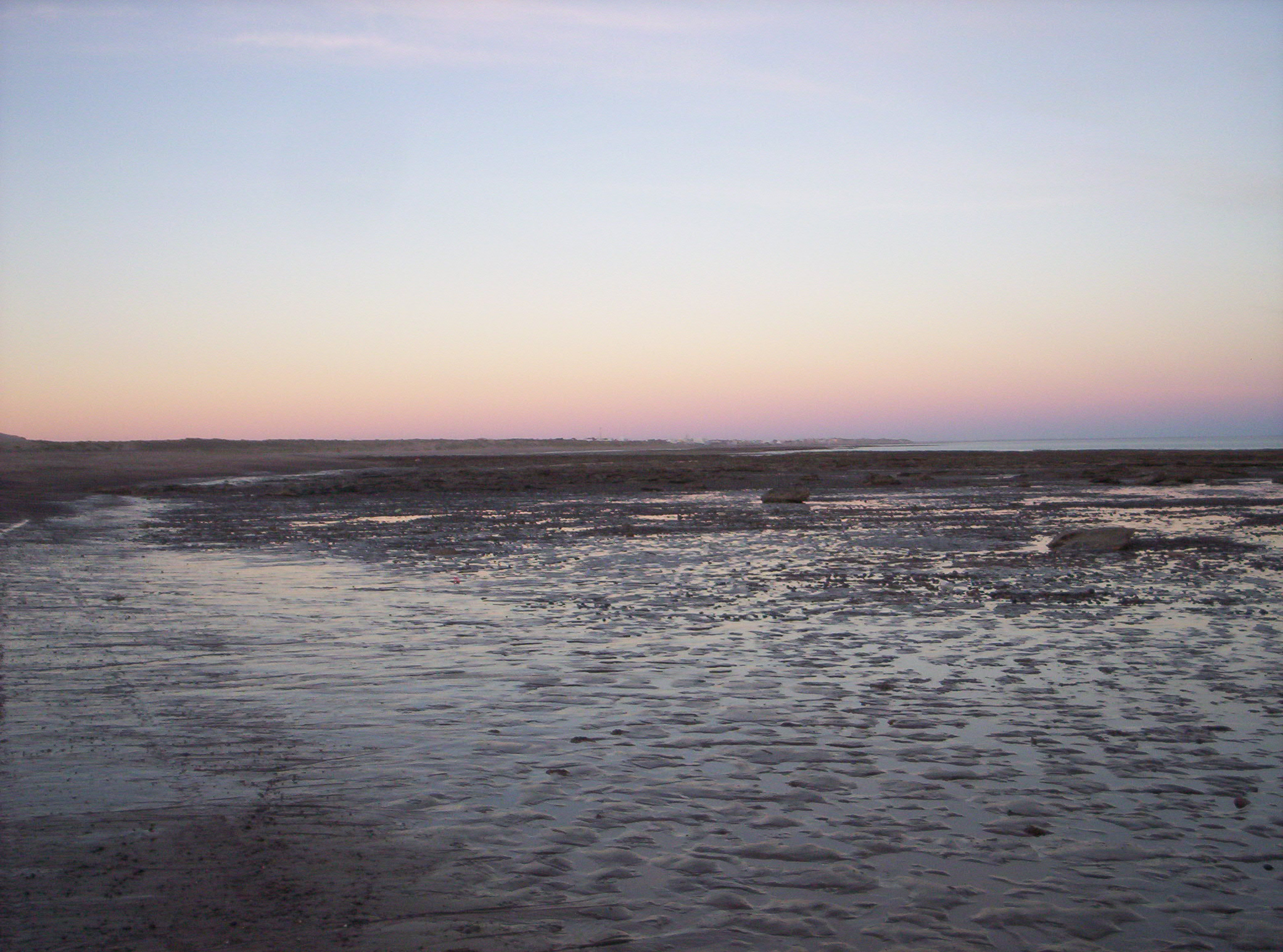 playa en las afueras de la villa